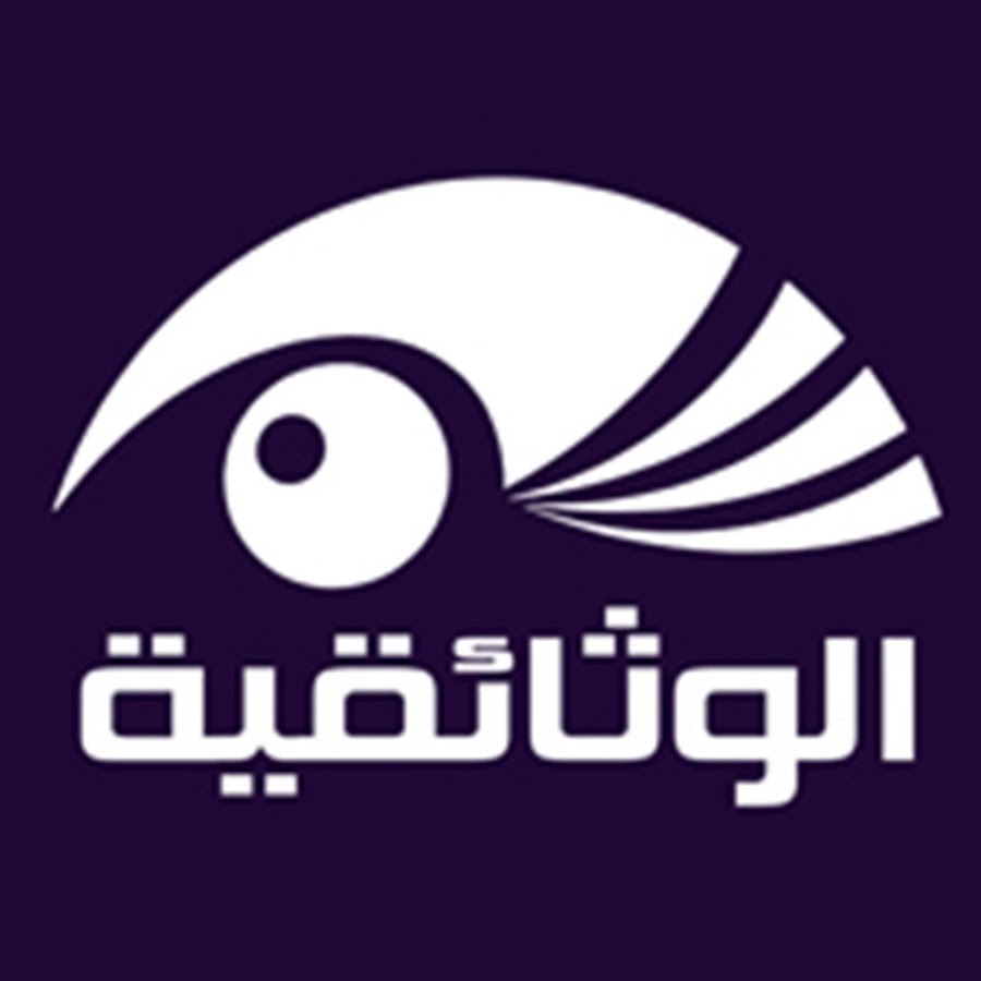 شعار قناة المجد الوثائقية